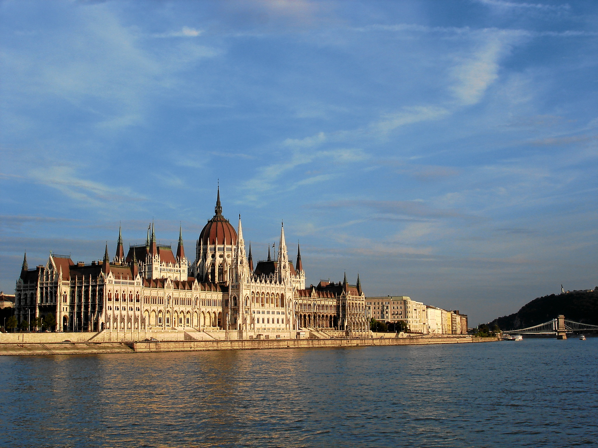 Budapest Parliament